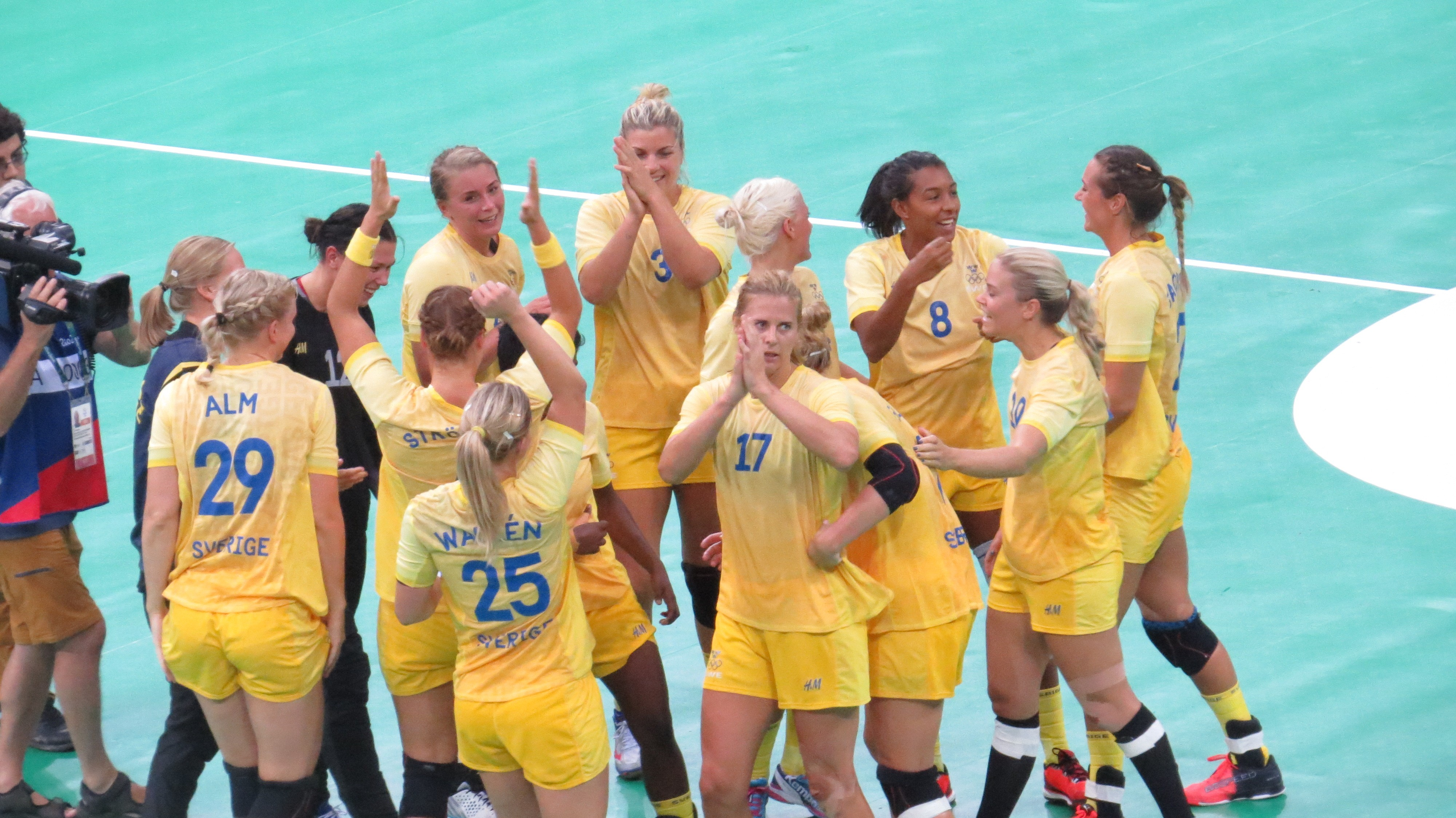 Rio 2016. sx 69